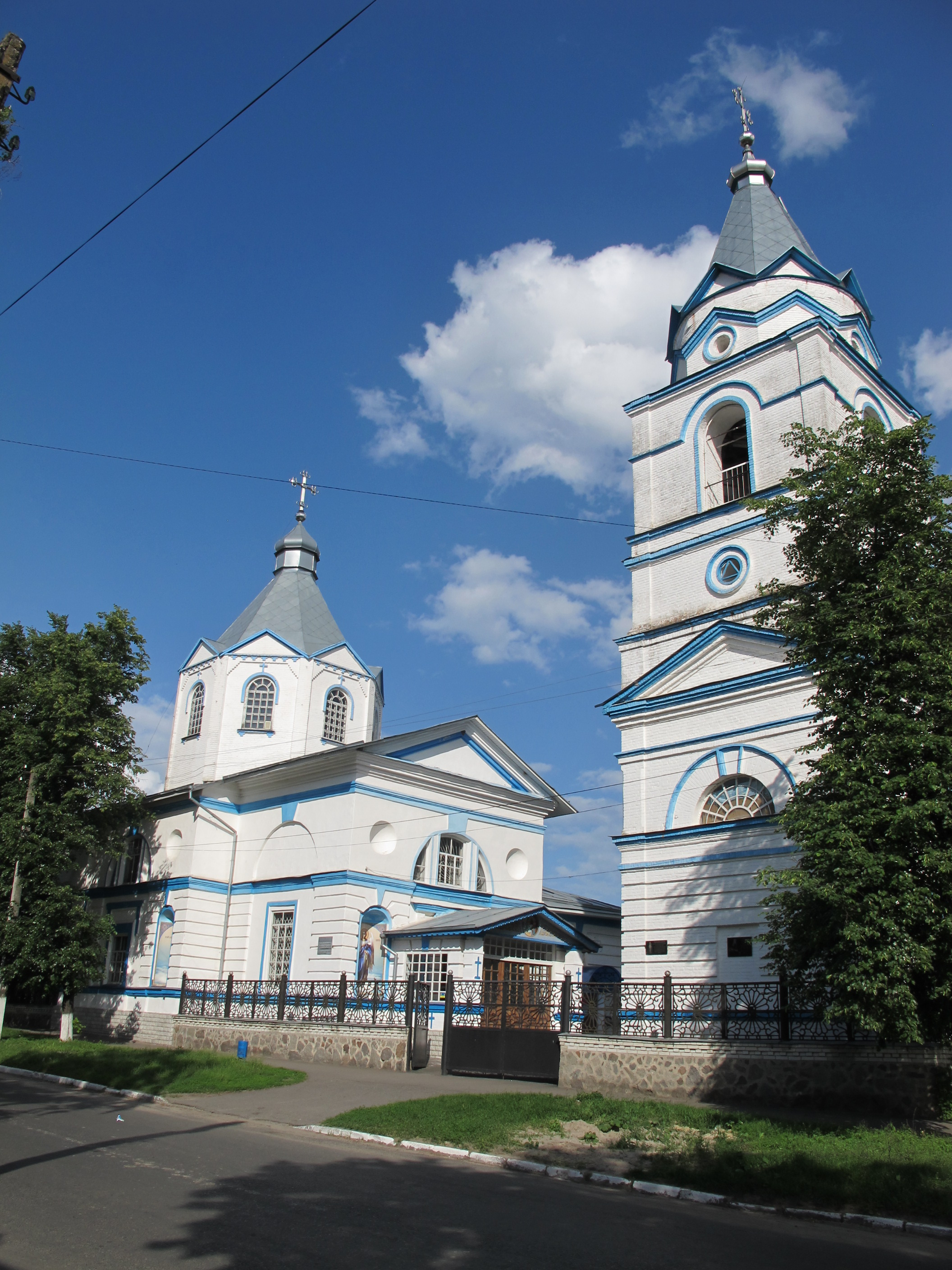 Церковь Благовещения Пресвятой Богородицы в Лохвице